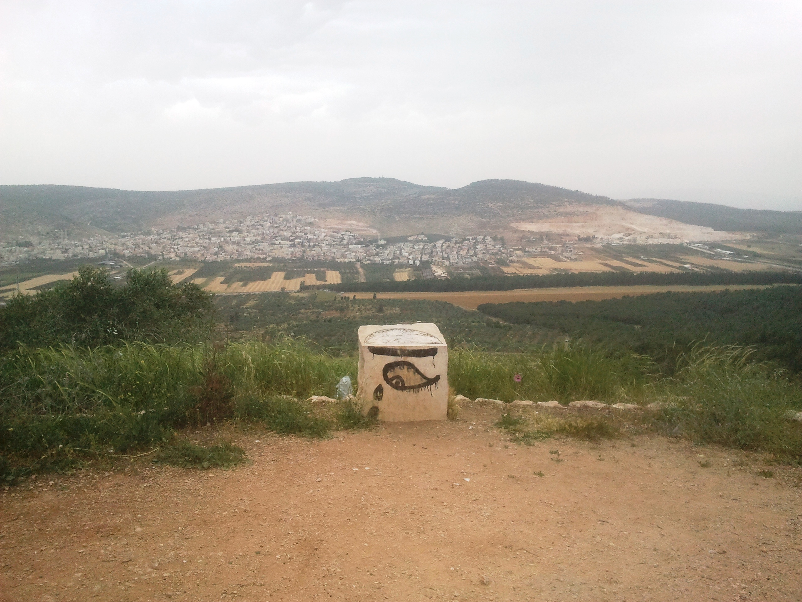 מצפור טורעאן בדרך נוף יער בית קשת. מהמצפור משקיפים על כביש 77 וטורעאן